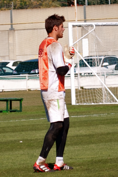 Fabricio Agosto durante un entrenamiento del Real Betis, temporada 2011/2012